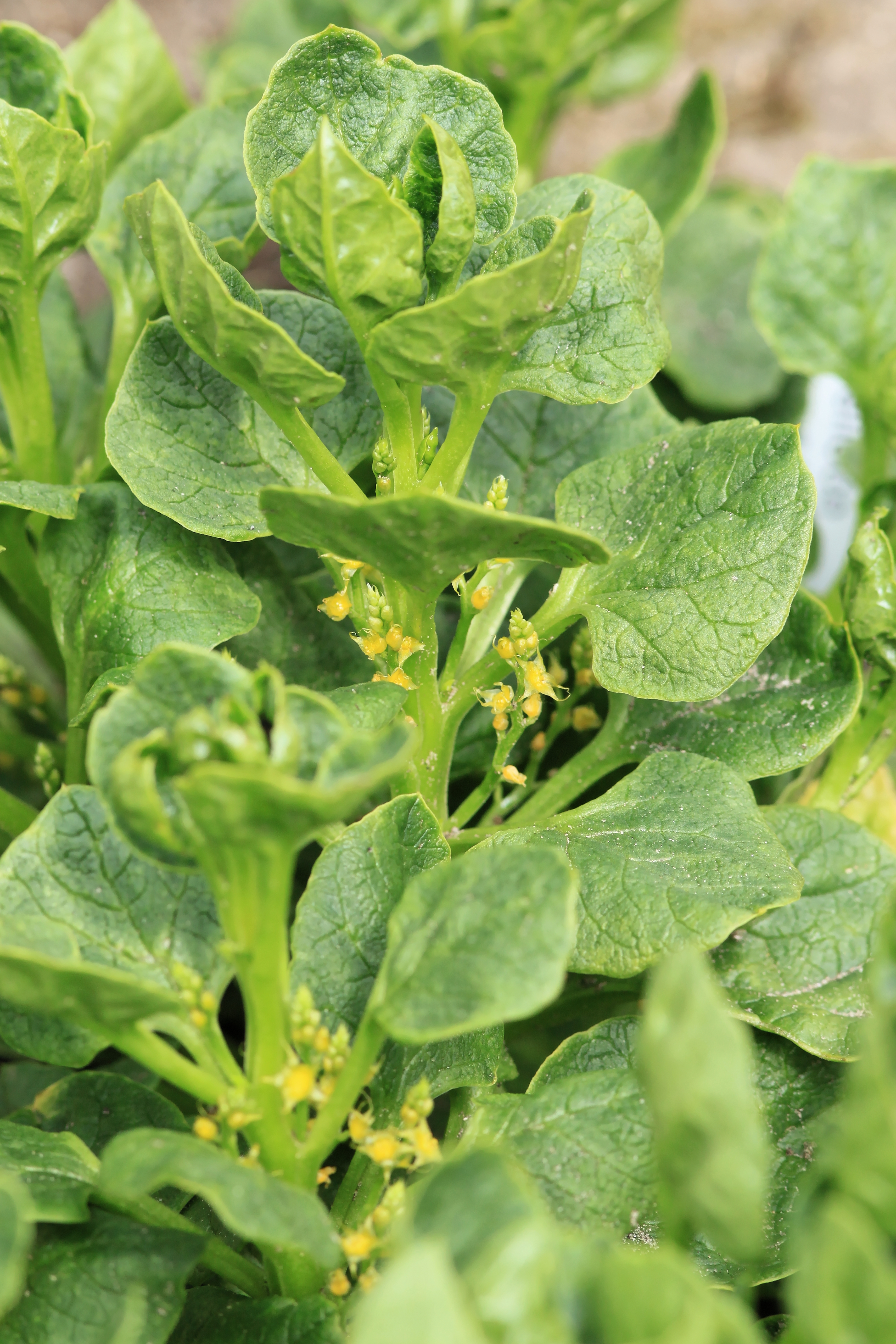 Ullucus tuberosus grown in a garden in Kluse (Emsland)